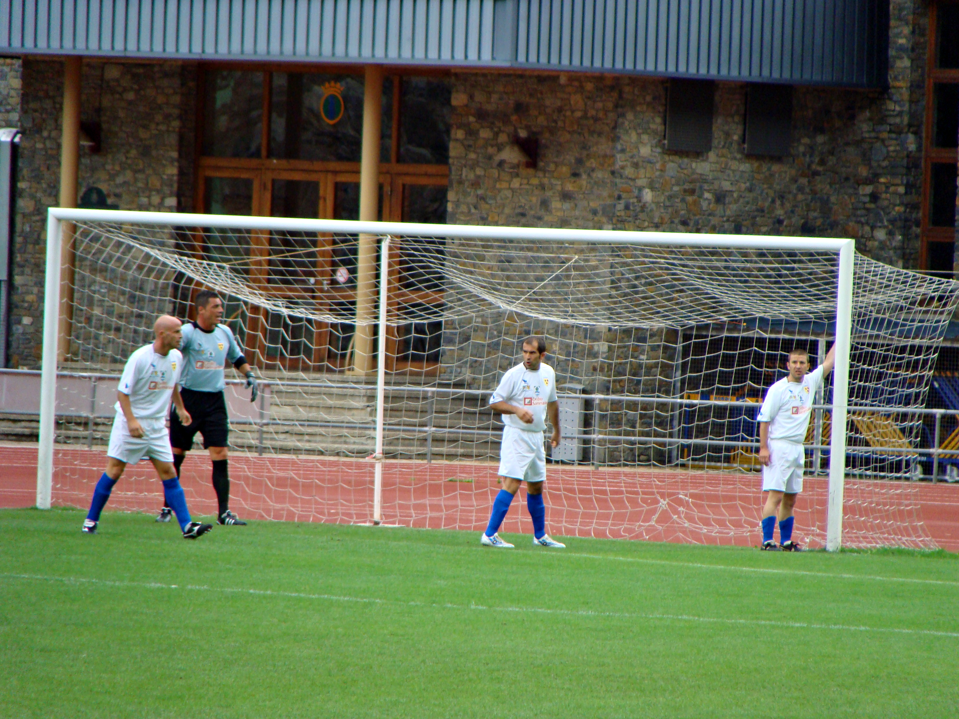 Andorra: Spieler von SP Tre Fiori (San Marino) beim UEFA-Champions-League-Spiel gegen UE Sant Julià in Andorra la Vella